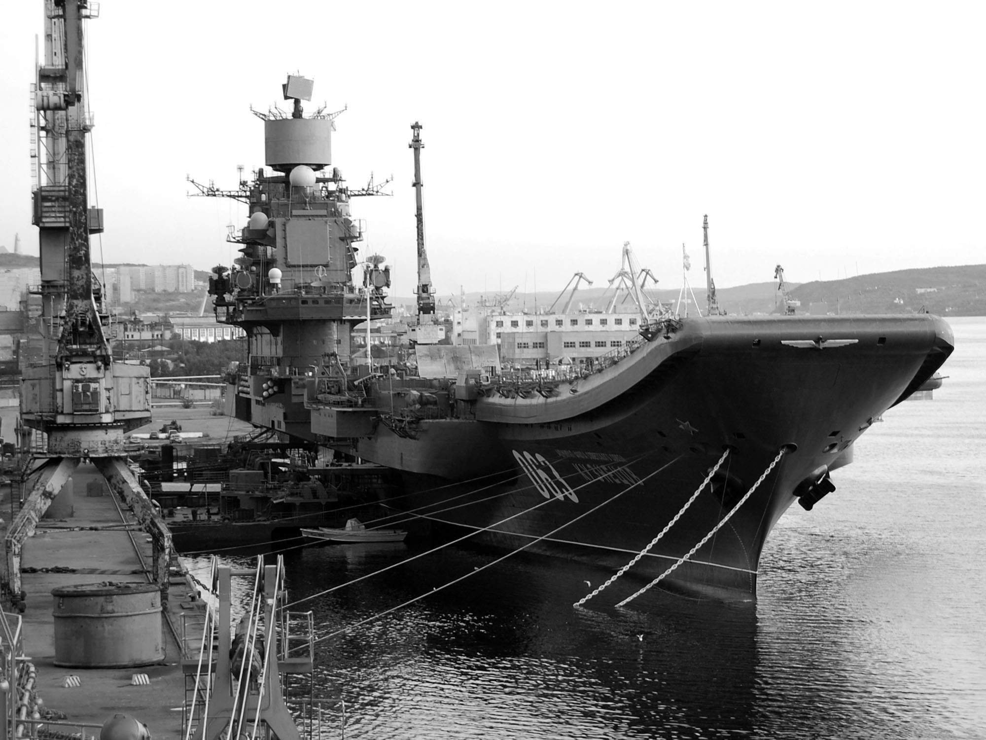 Тяжёлый авианесущий крейсер «Адмирал Кузнецов»